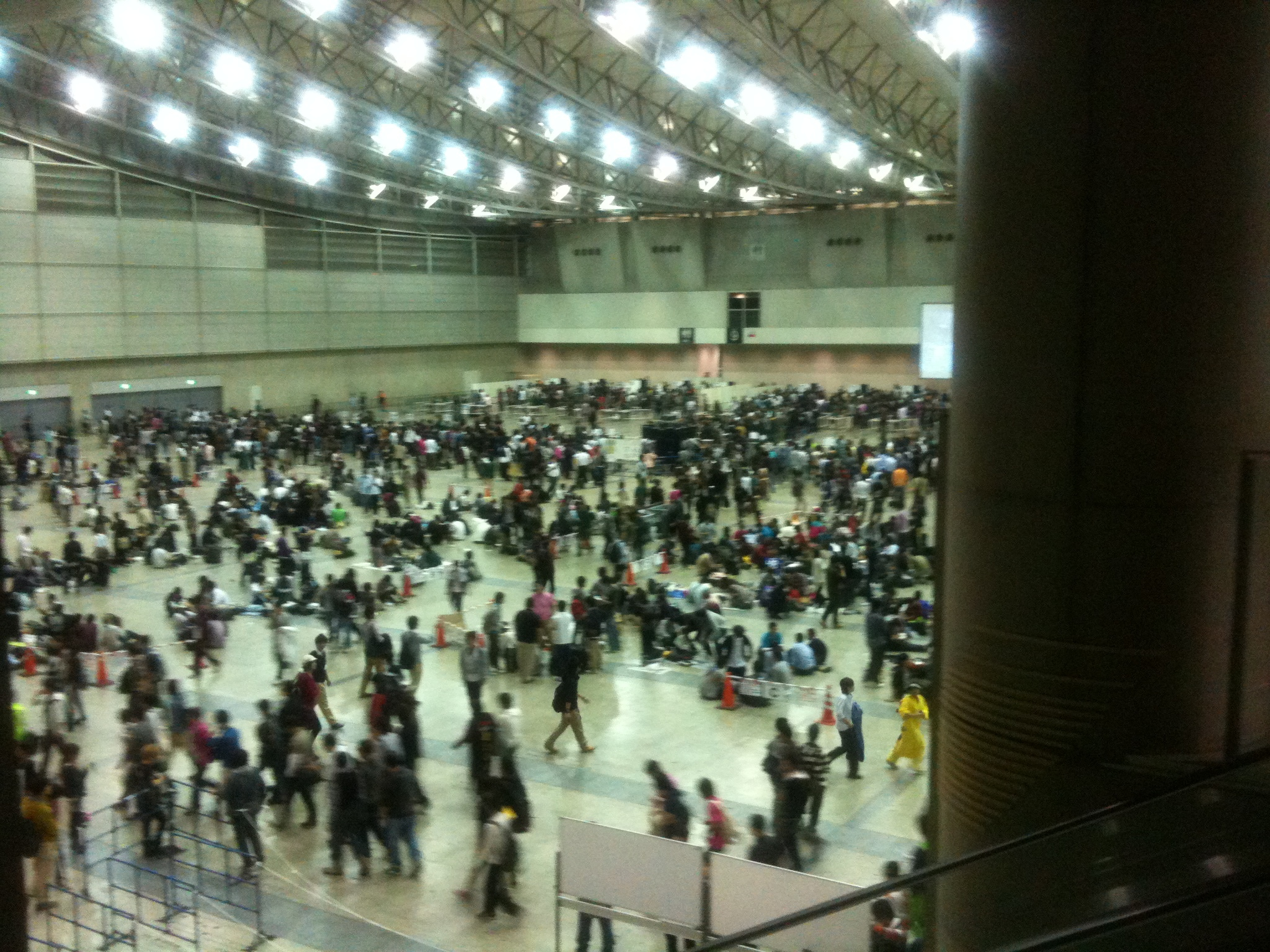 AKB48 シングルCD「風は吹いている」特典の握手会（2011年10月30日、千葉県千葉市美浜区・幕張メッセ）